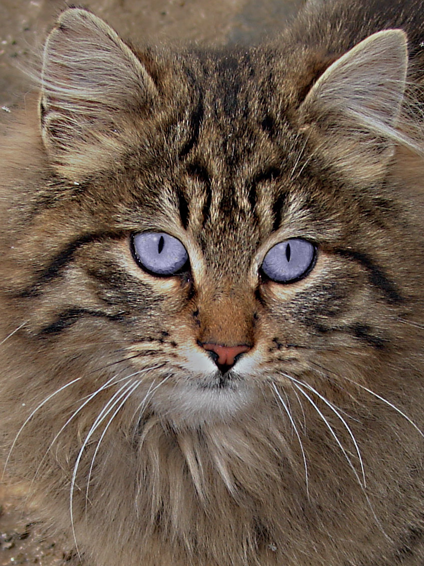 Cat Portrait